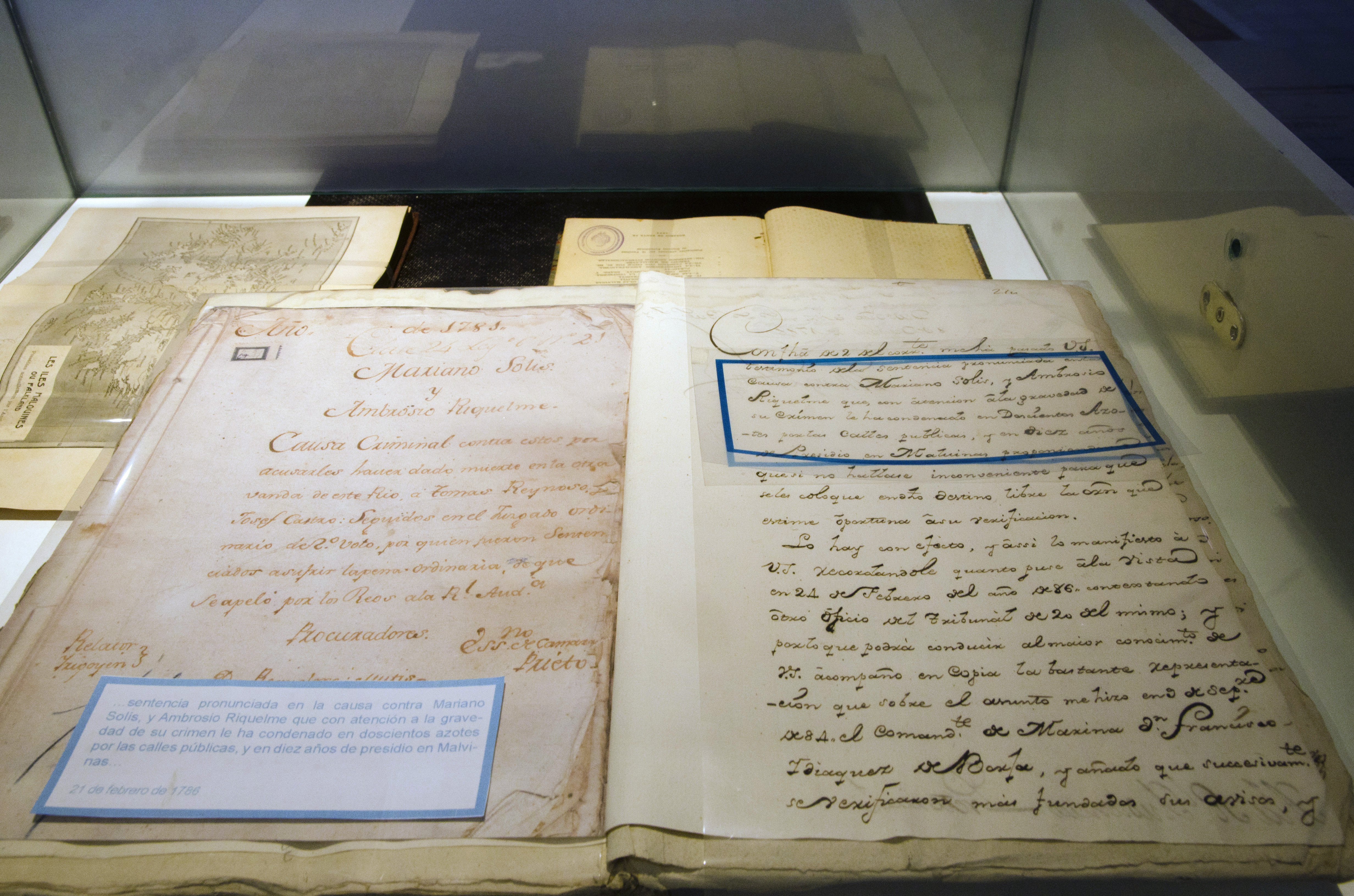 Museo Malvinas e Islas del Atlántico Sur Fotos: Romina Santarelli / Ministerio de Cultura de la Nación.